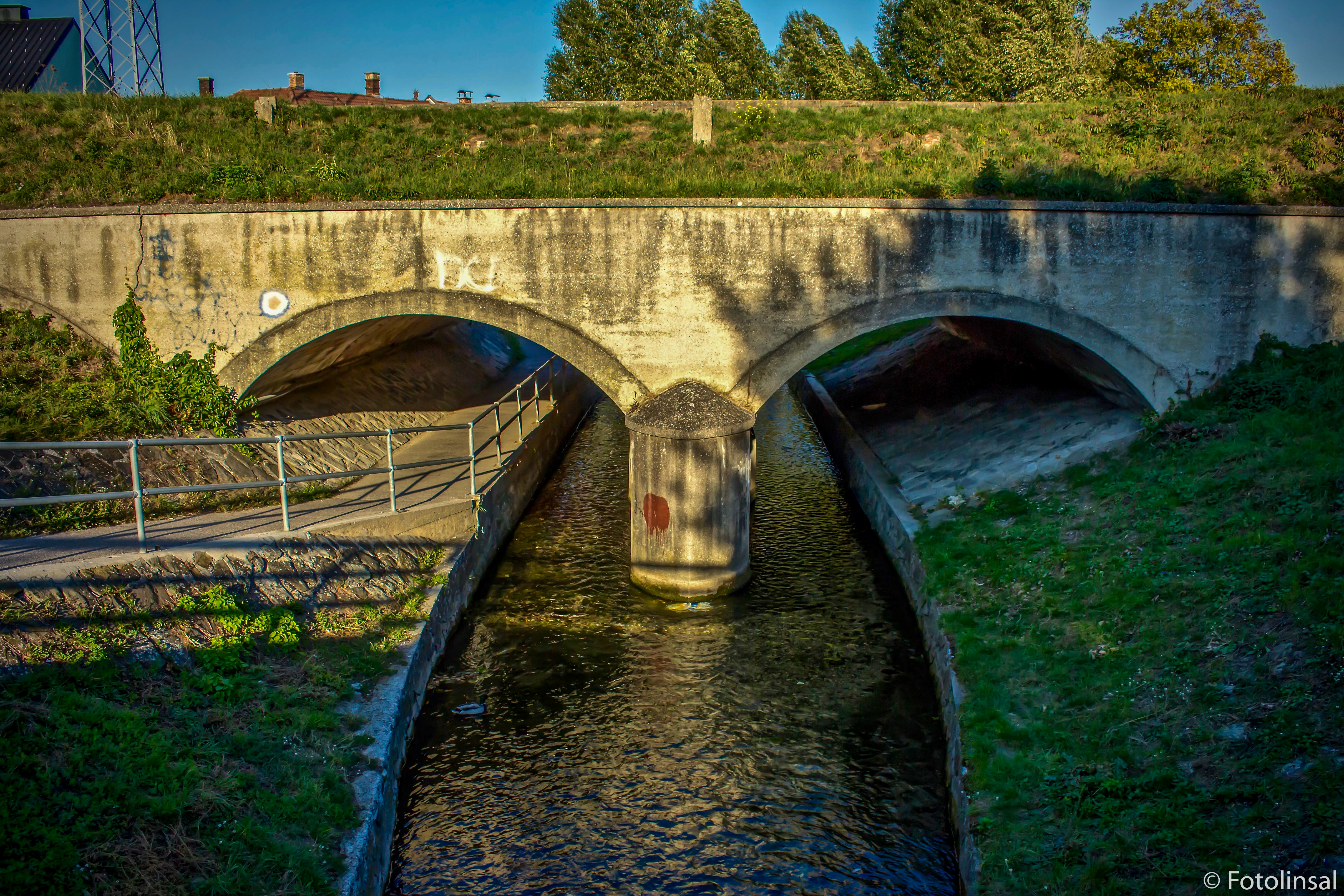 Im Stadtgebiet Wiener Neustadts kreuzen sich tatsächlich zwei Bäche, nämlich die Warme Fischa (unten) und der Wiener Neustädter Kanal(oben).